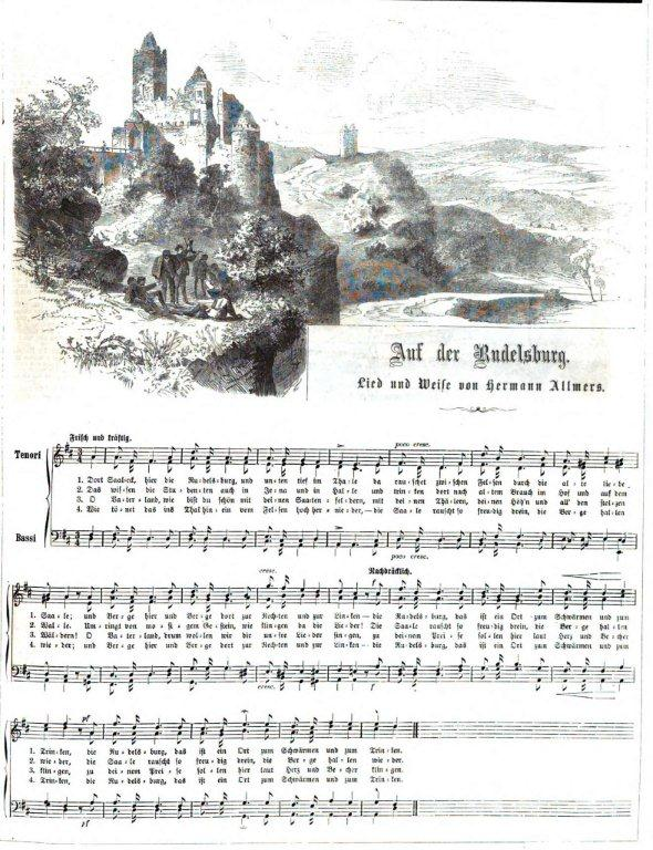 Liedtext "Auf der Rudelsburg" von Hermann Allmers.